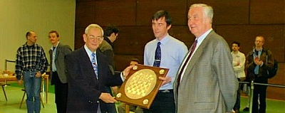 Siegerehrung der Porzer Mannschaft, Schachbundesliga Saison 1998/1999. Links Egon Ditt, rechts Wilfried Hilgert